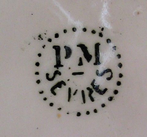 Signature Paul Milet, Sèvres vers 1930